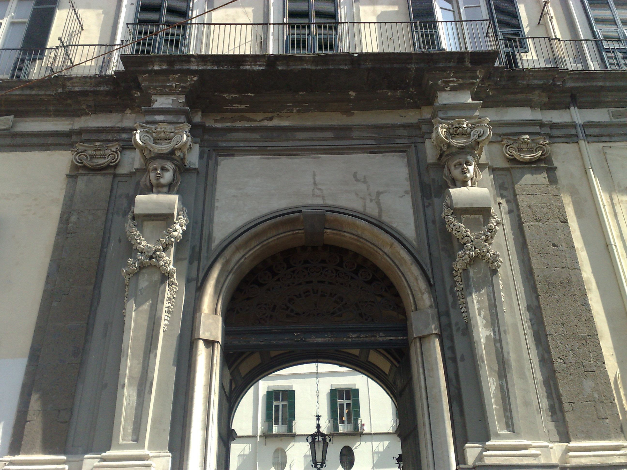 Particolare portone Palazzo Calabritto (Napoli)